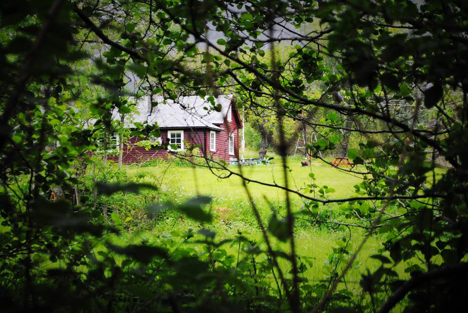 Vassli i Valevåg, et popultært sted for utenlandsk turister. Foto